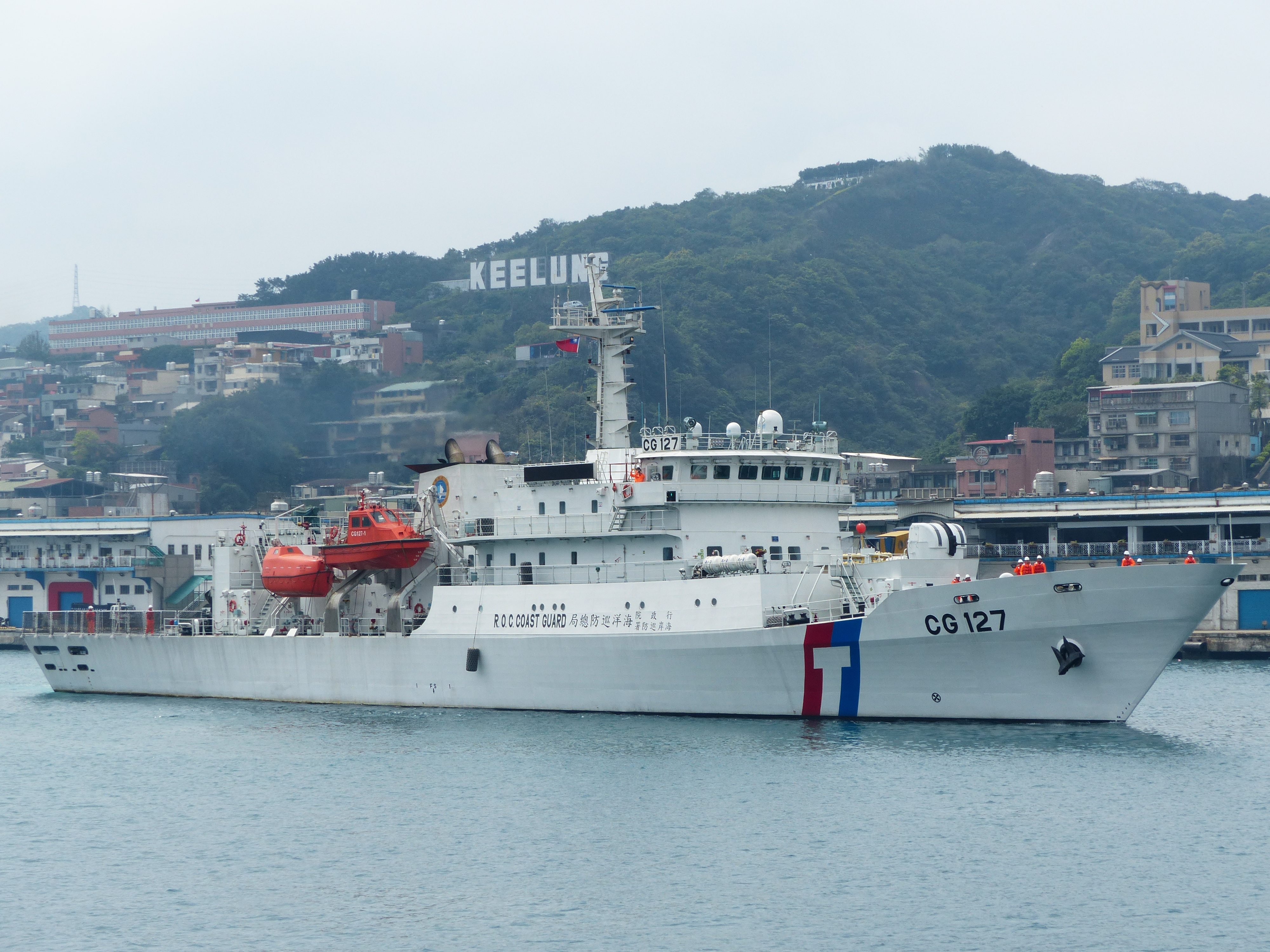 中文（台灣）: 基隆港出港中的海巡署巡防艦新北（CG-127）。